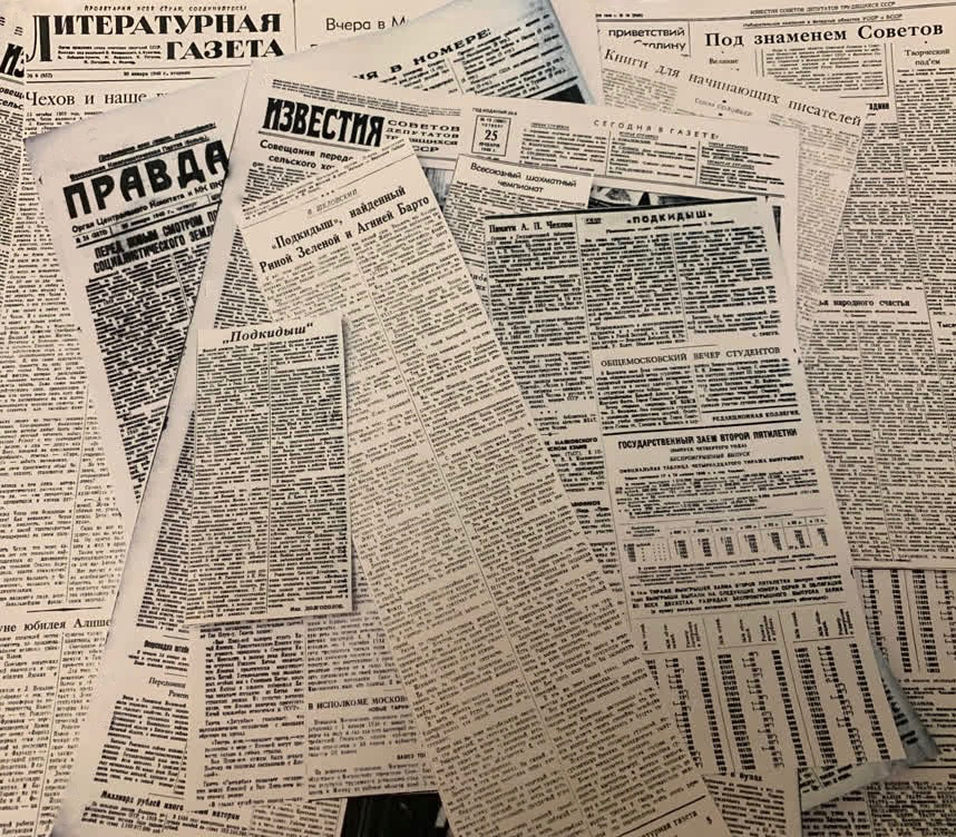 Коллаж газет января 1940 года со статьями о фильме "Подкидыш". Собственная работа. Защищённые тексты не читаются, только заголовки.